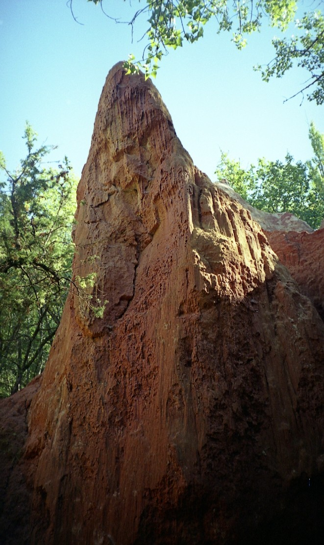 Photo personnelle d'une partie de la vallée des saints, près de Boudes (63).